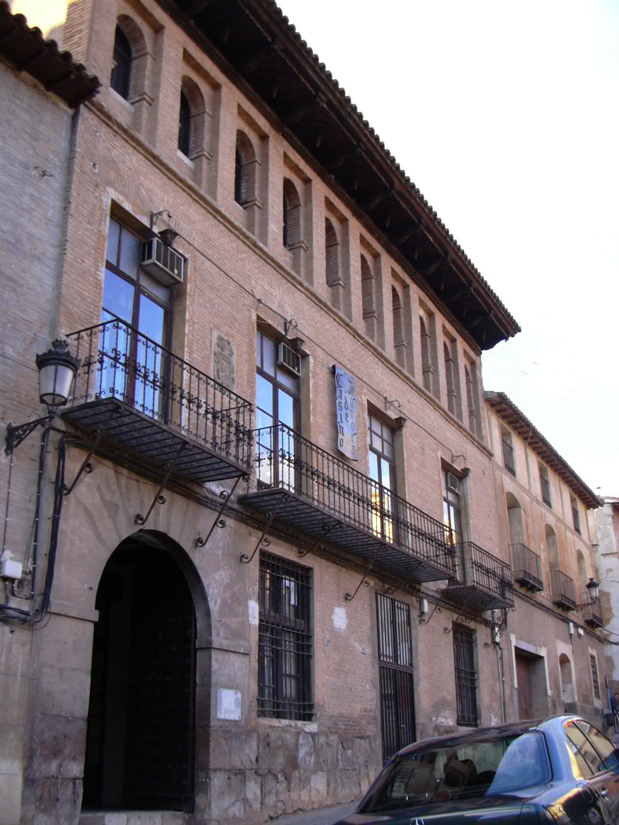 Daroca - Edificio del Casino